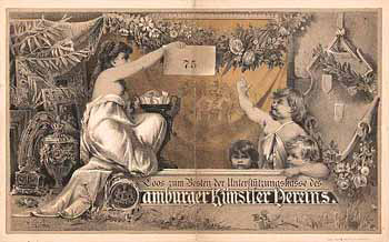 Los zur Unterstützung der Vereinskasse